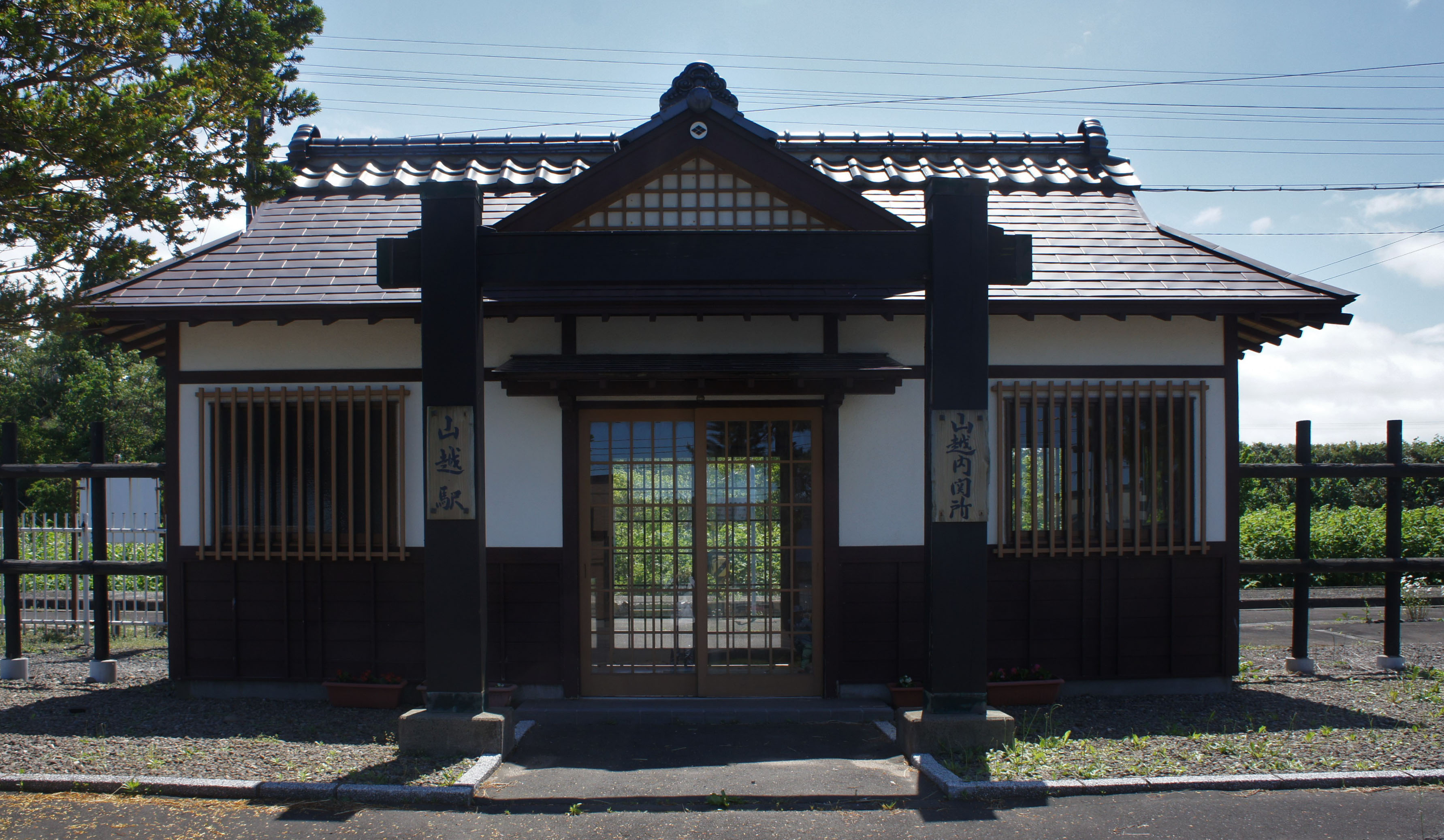 JR函館本線・山越駅の駅舎